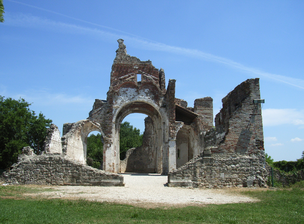 Abbazia di S. Eustachio, Nervesa della Battaglia, Treviso.